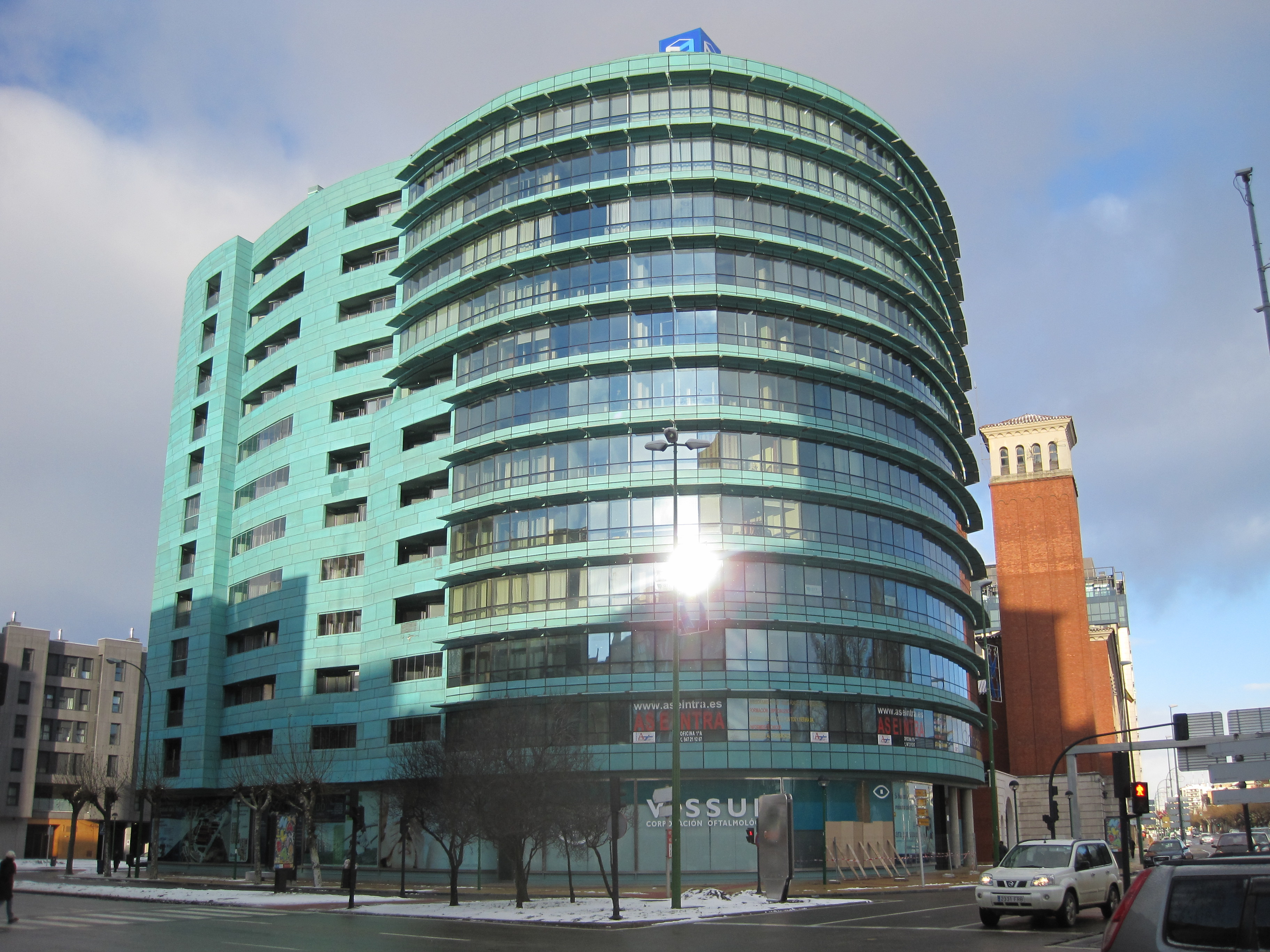 Vista del edificio verde de Plaza del Rey, en Burgos.